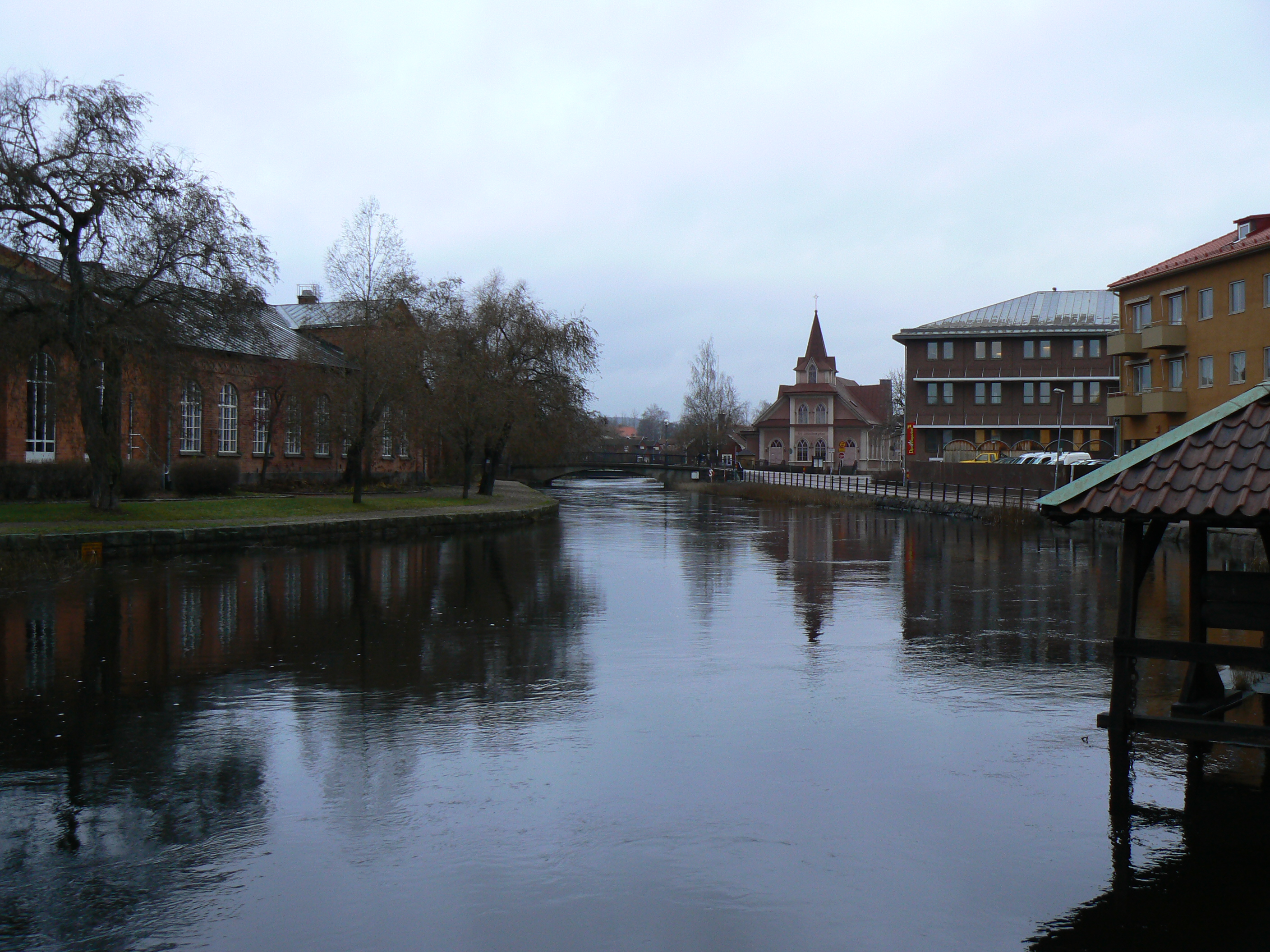 River Faluån in Falun, Sweden. Photo by Skvattram 2006-11-25.